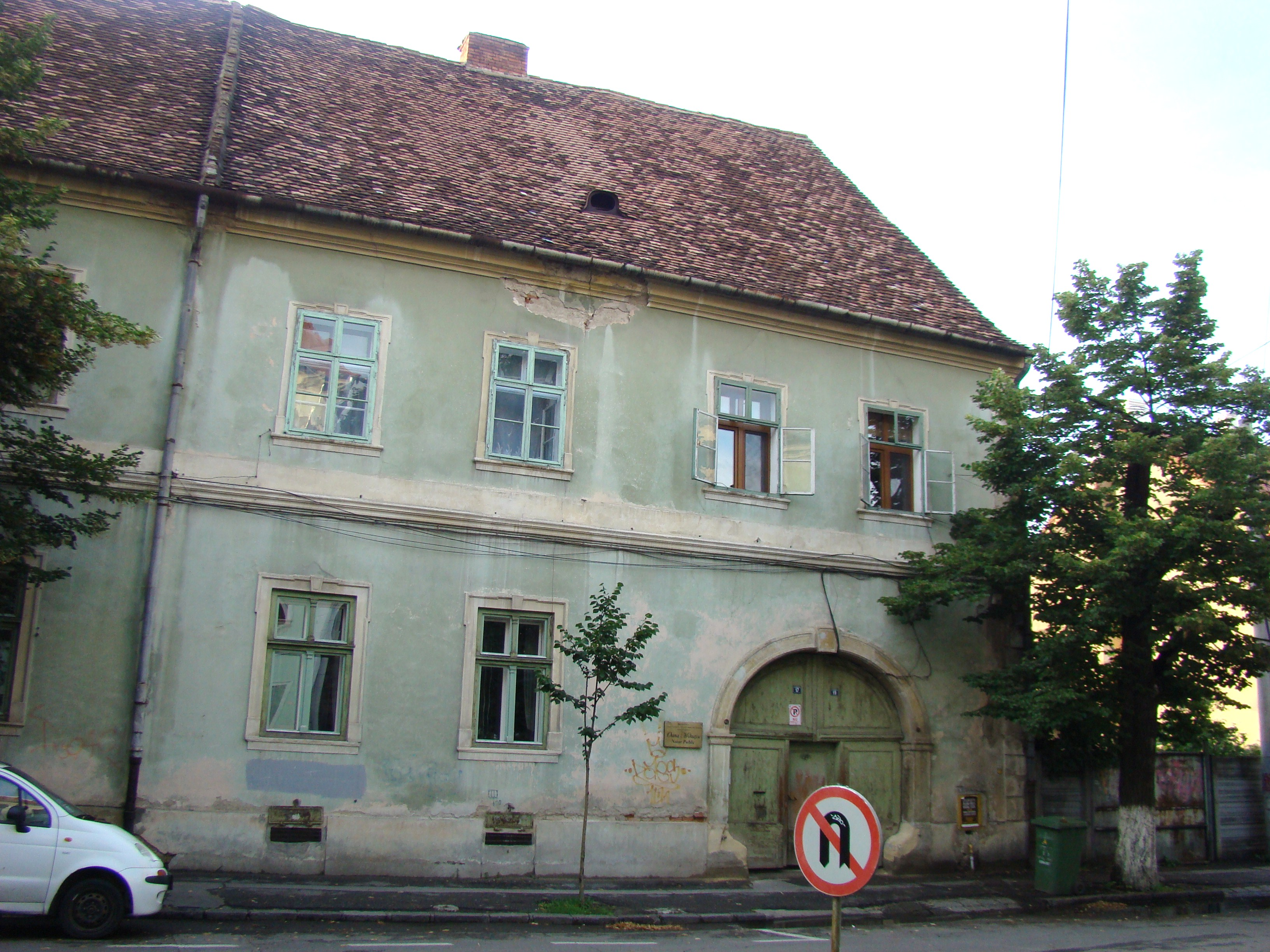 Casele Profesorilor reformați 03